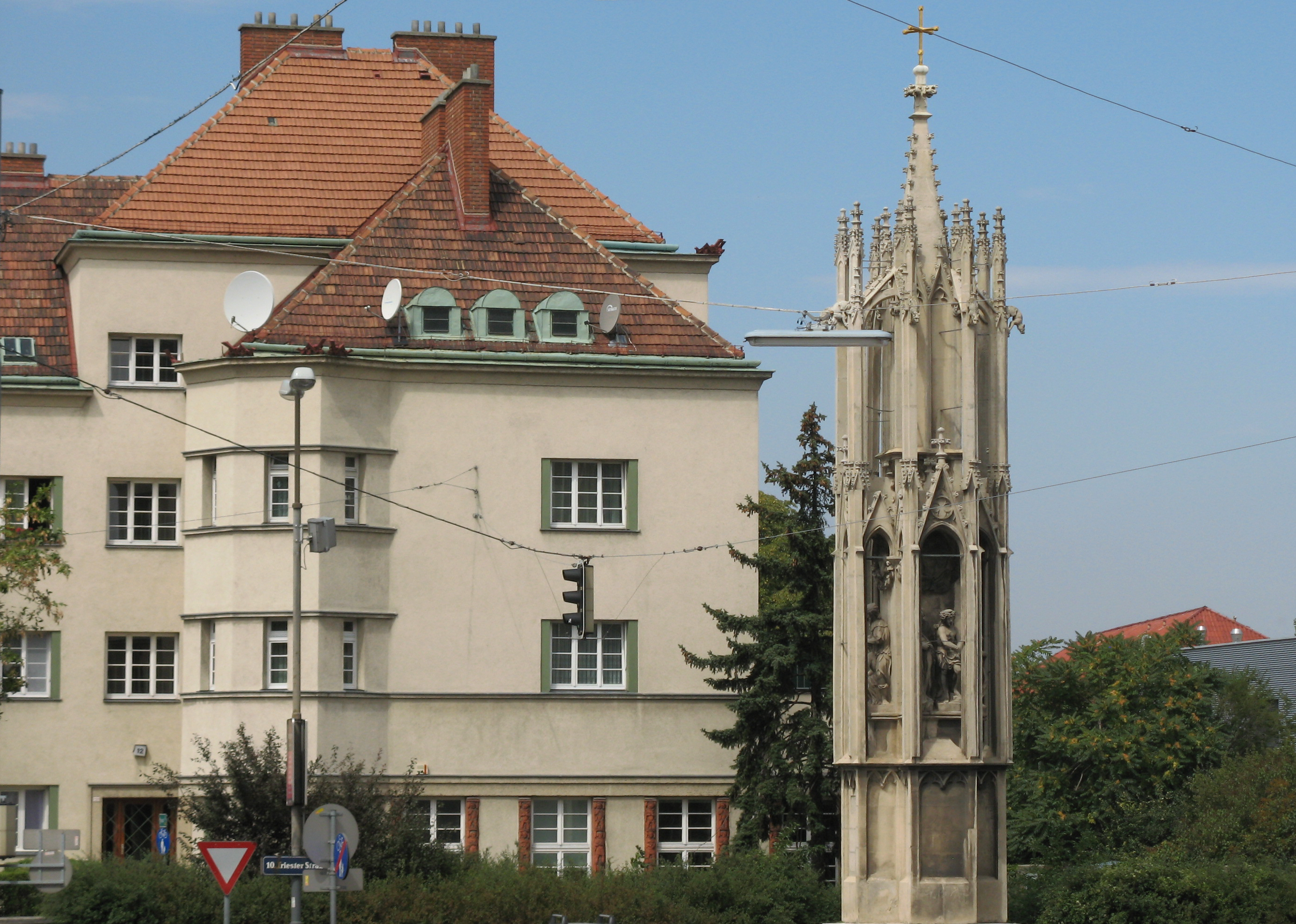 Spinnerin am Kreuz (1451/52), dahinter George-Washington-Hof (1927-30), Triester Straße 52, Wien-Favoriten